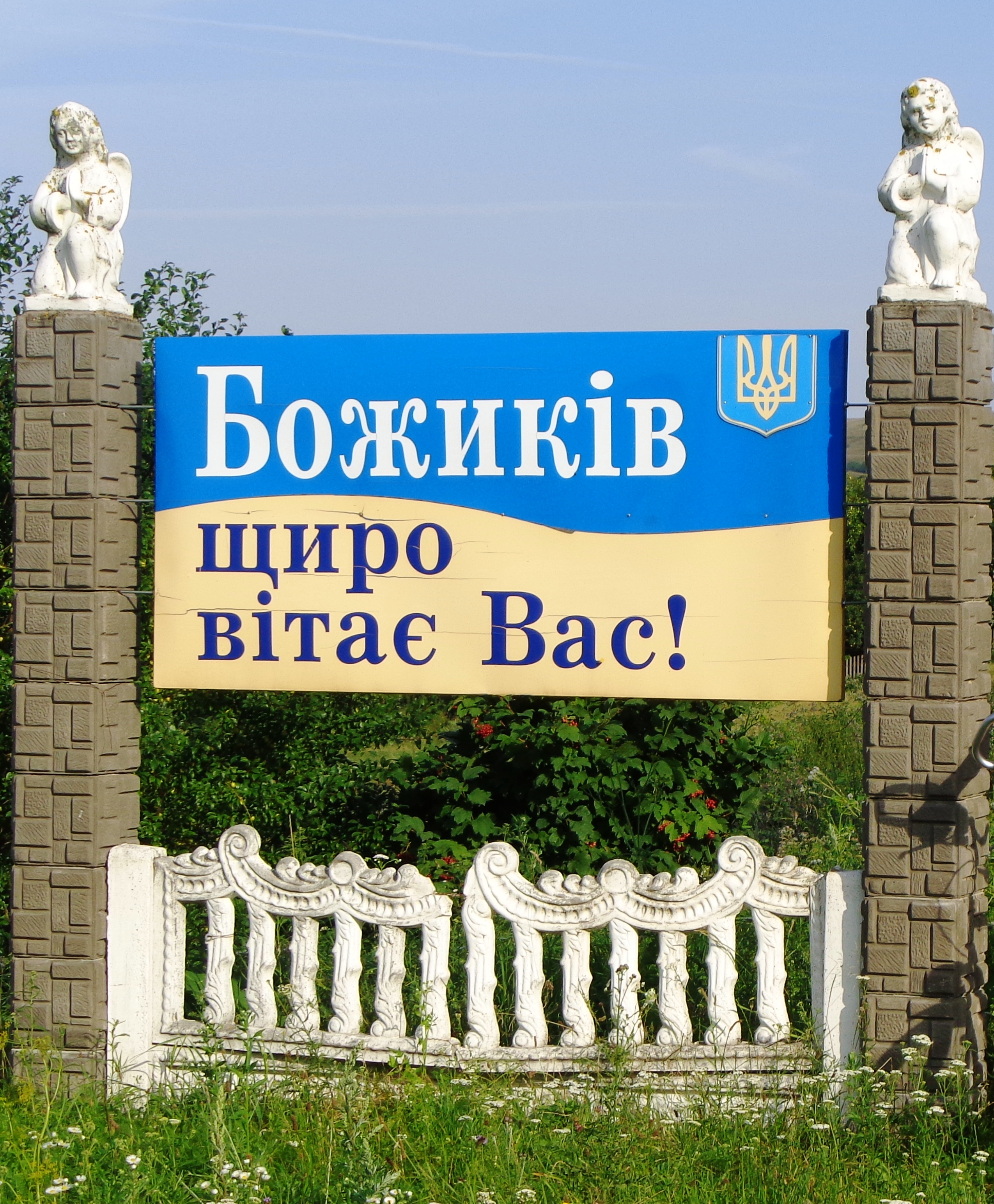 Хрест у Божиків